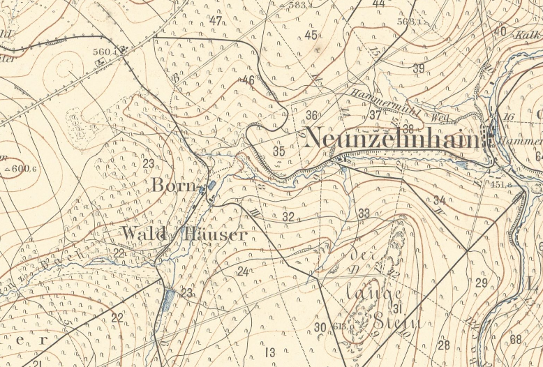 Ausschnitt aus: Topographische Karte (Äquidistantenkarte) Sachsen, Ausschnitt Dresden, bearbeitet im topographischen Bureau des Königlichen Generalstabes, 1:25000, 46 x 44 cm, Blatt 115, 1912.